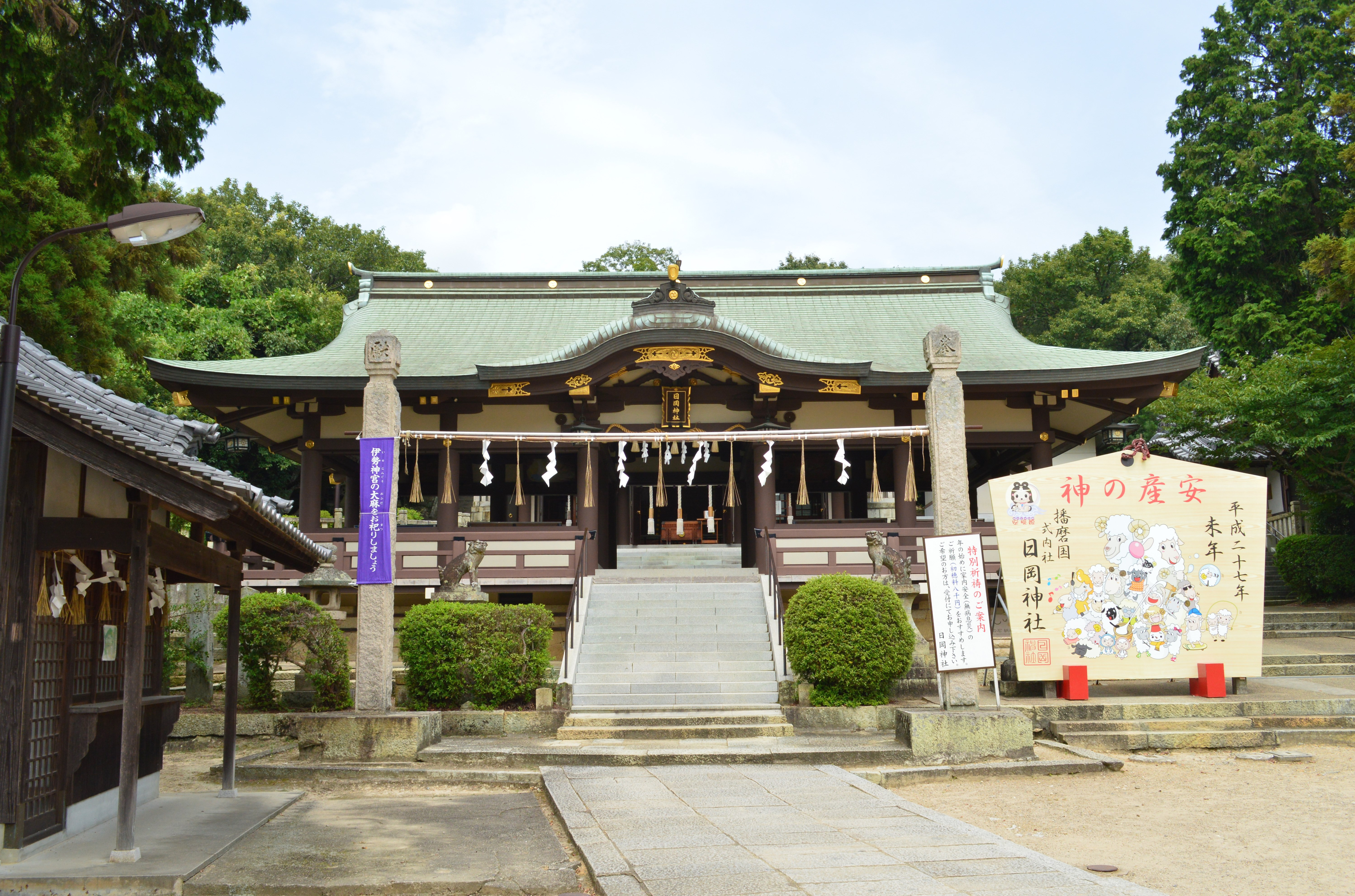 日岡神社 外拝殿